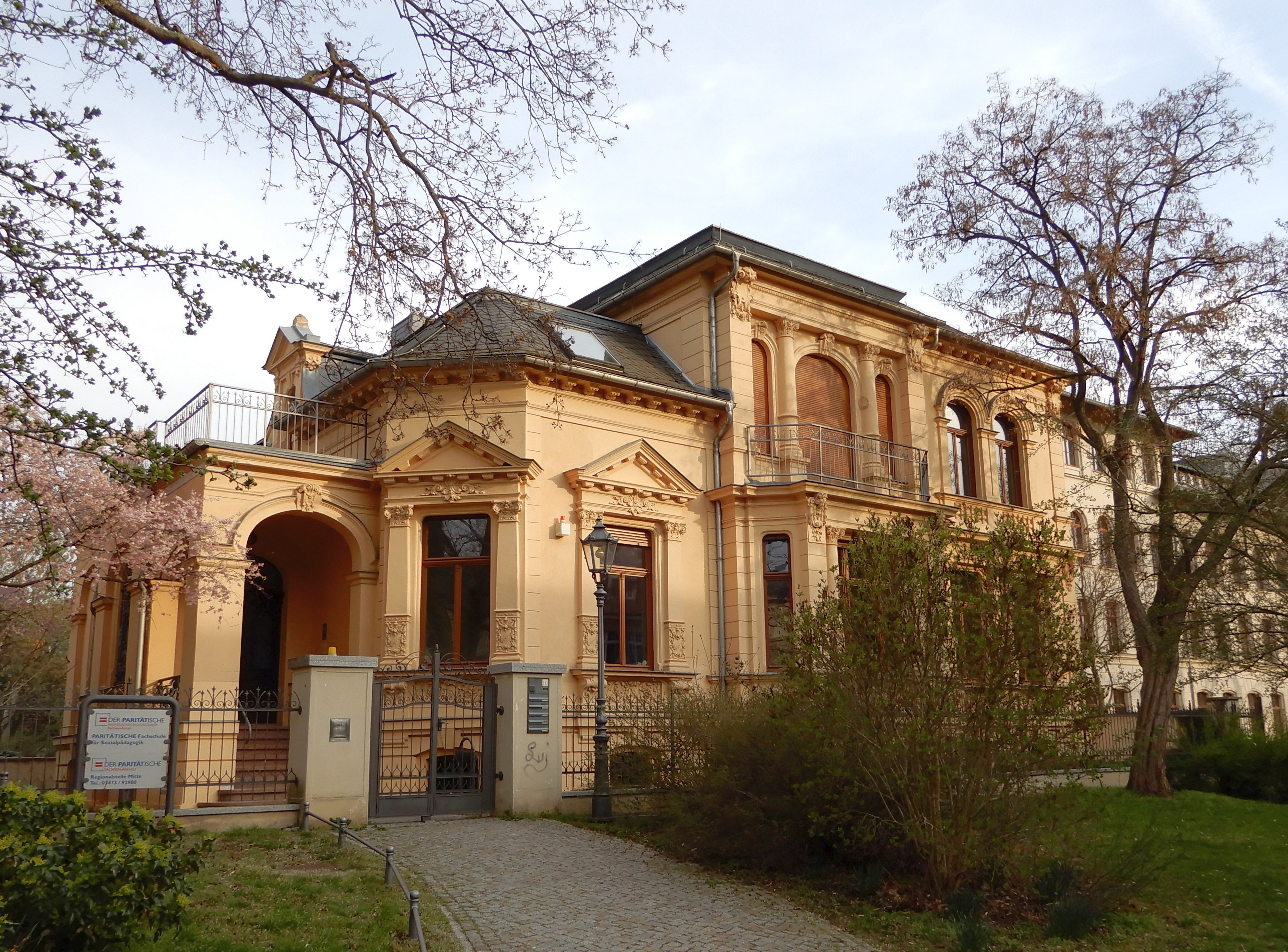 Villa Dr.-Wilhelm-Külz-Platz 10